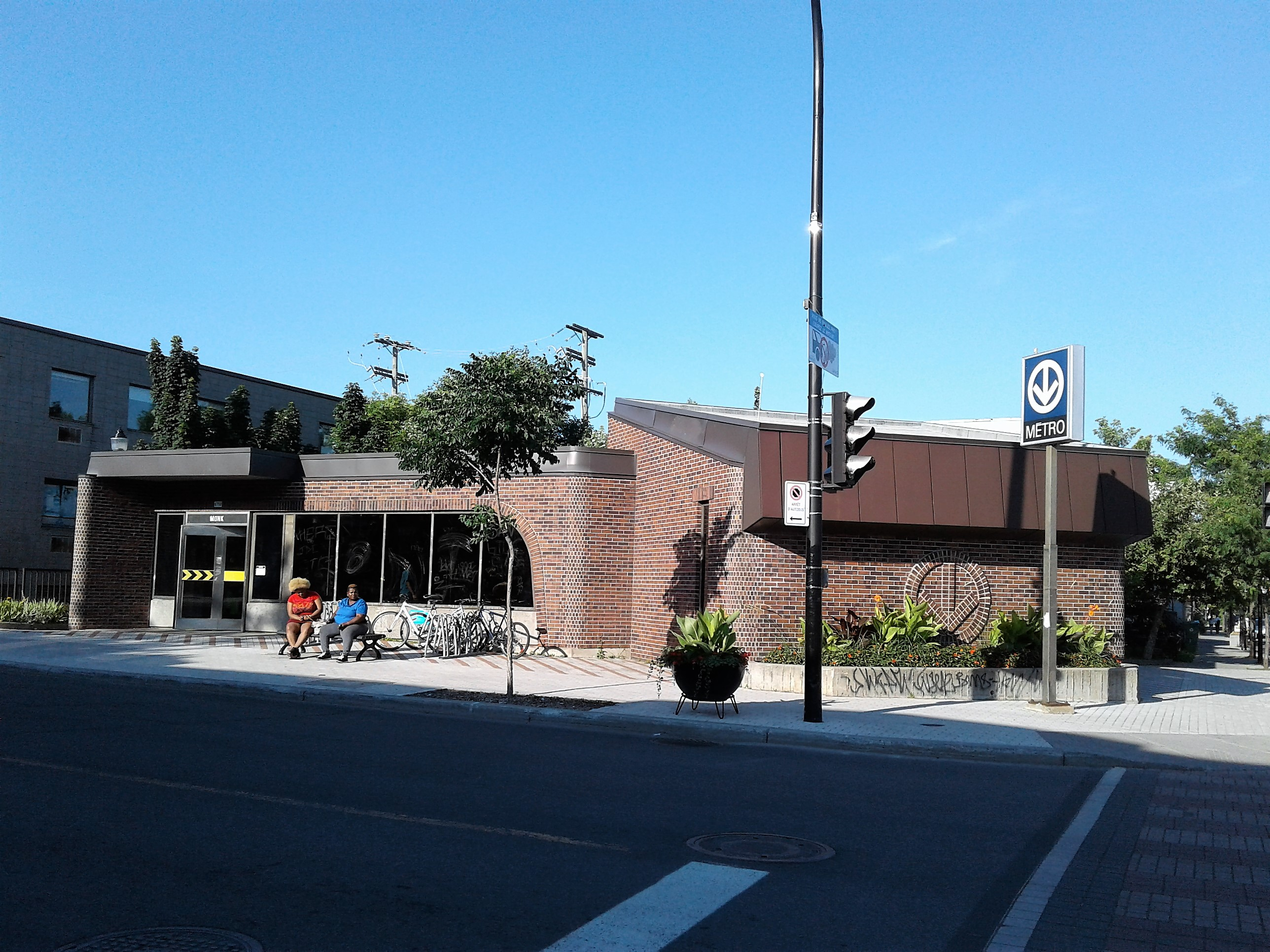 Station Monk du métro de Montréal